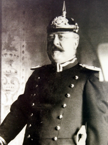 Gustav Hatzfeld, Polizeichef Ludwigshafen am Rhein